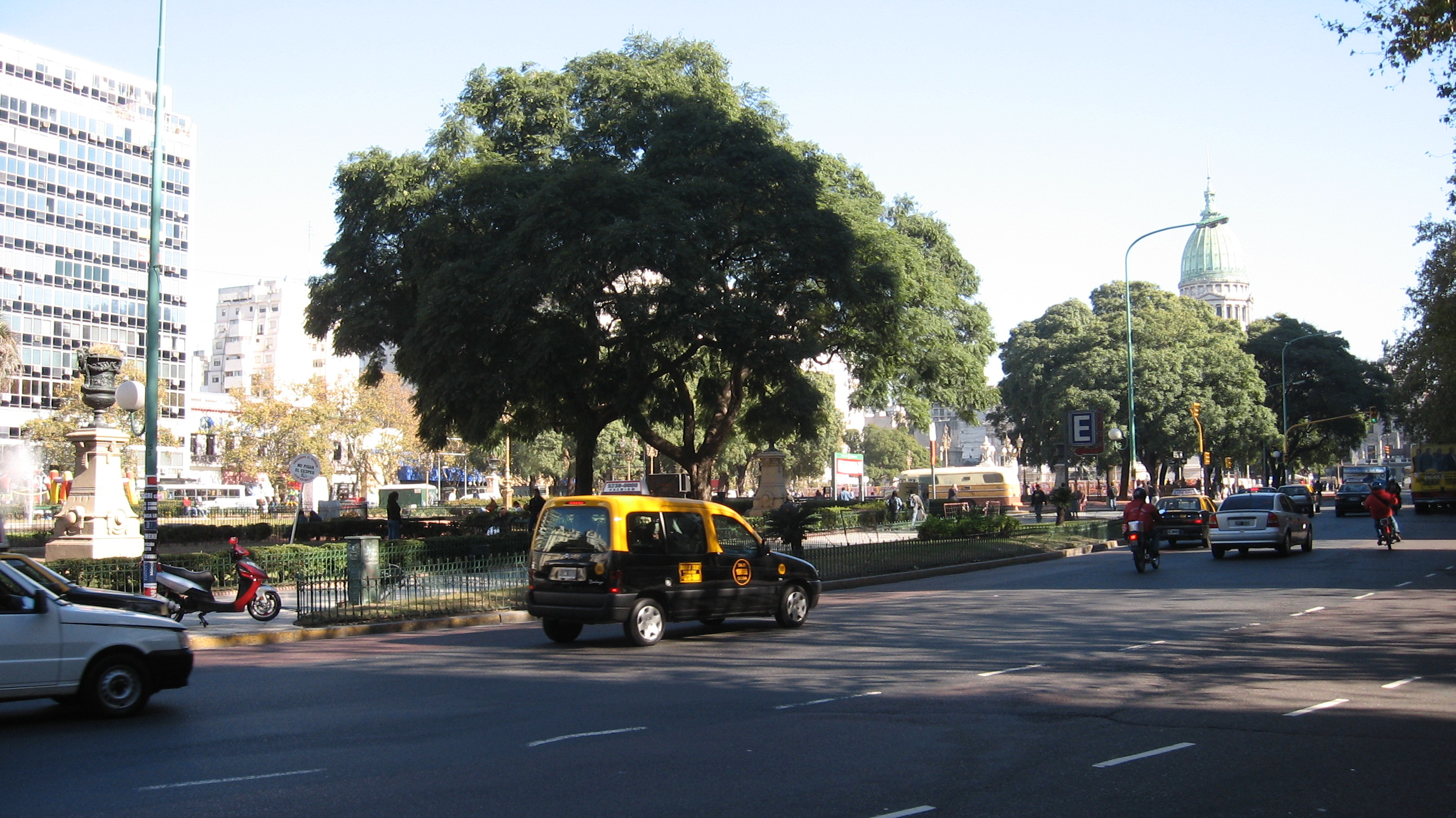 Plaza de los Dos Congresos, en Buenos Aires